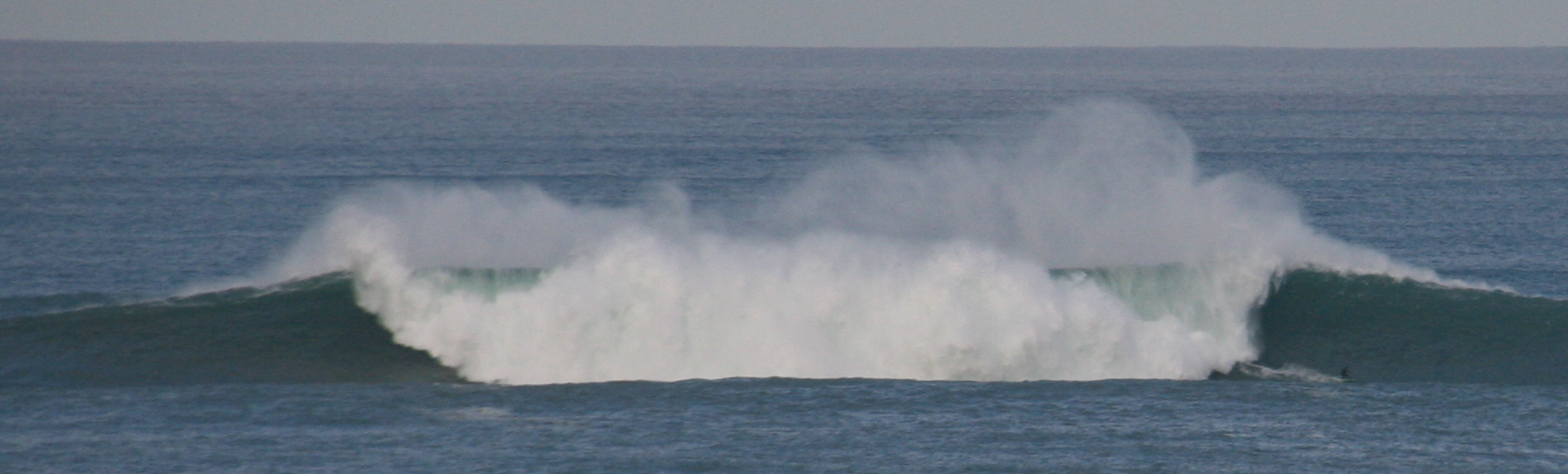 La montagne océanique des basques